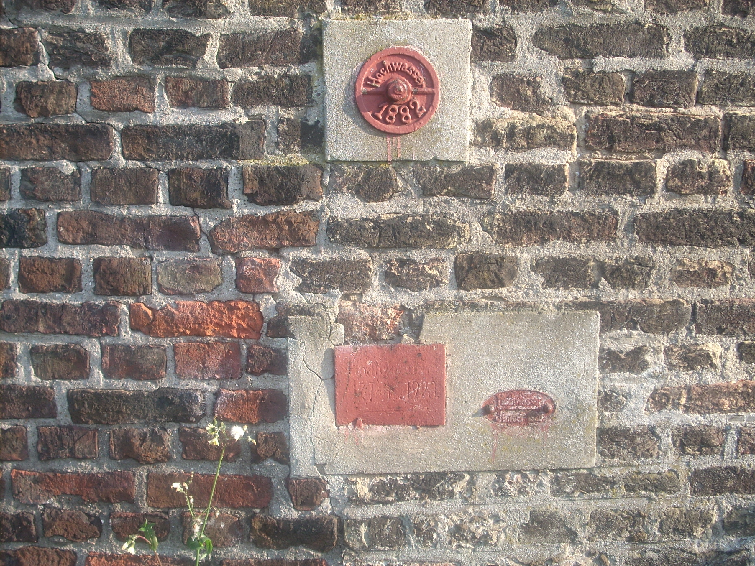 Die Hochwassermarken in Duisburg-Mündelheim deuten auf die Rheinhochwasser in den Jahren 1882 und 1919/20